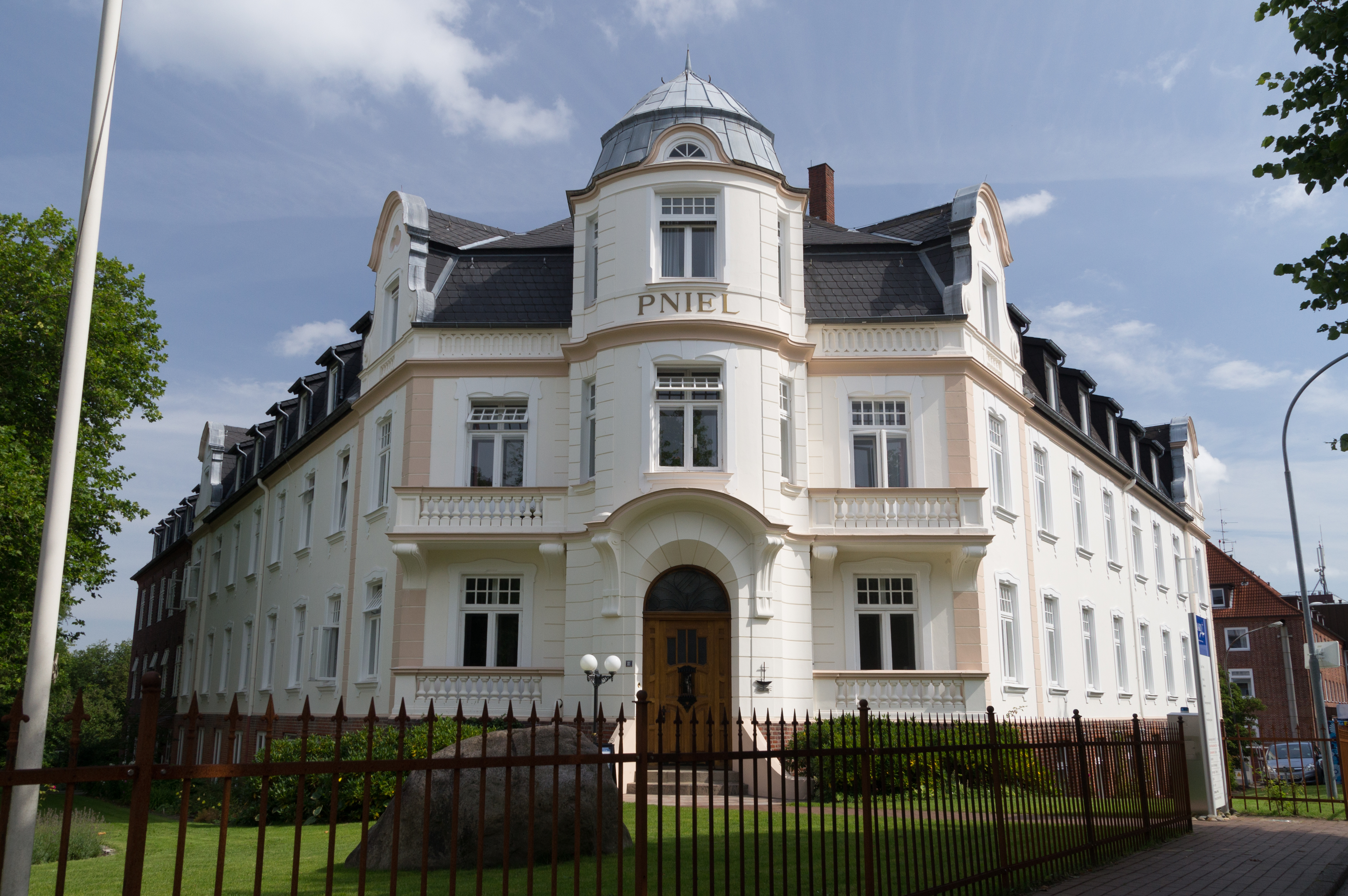 Flensburg-Westliche Höhe; Duburger Straße 81; Feierabendheim Pniel; Denkmal-Nr. 3. Früher Feierabendhaus der Diakonissen, dient nach der Renovierung der Diakoniegemeinschaft.